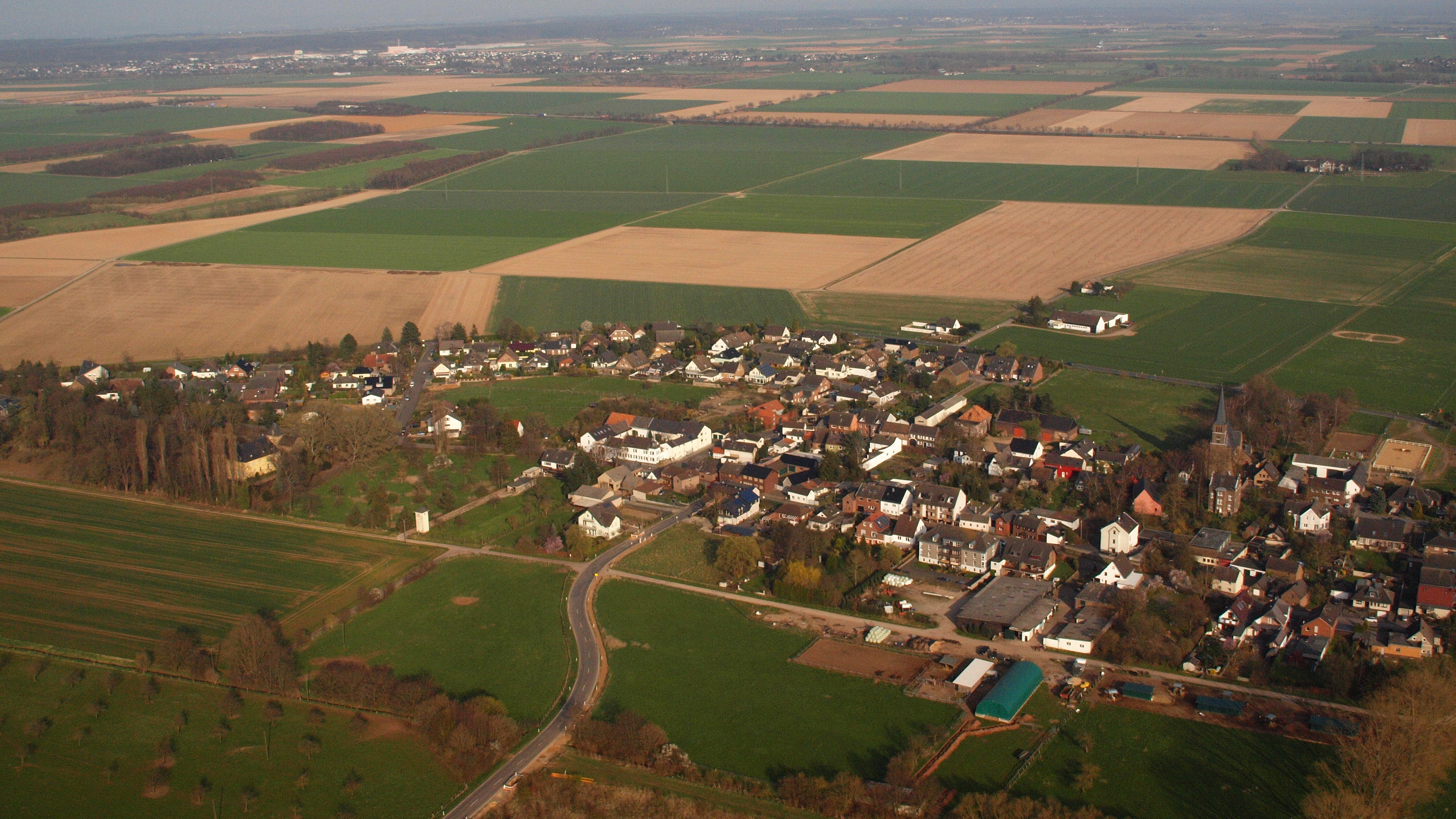 Niederberg (Erftstadt), links Burg Niederberg, Luftaufnahme (2015)